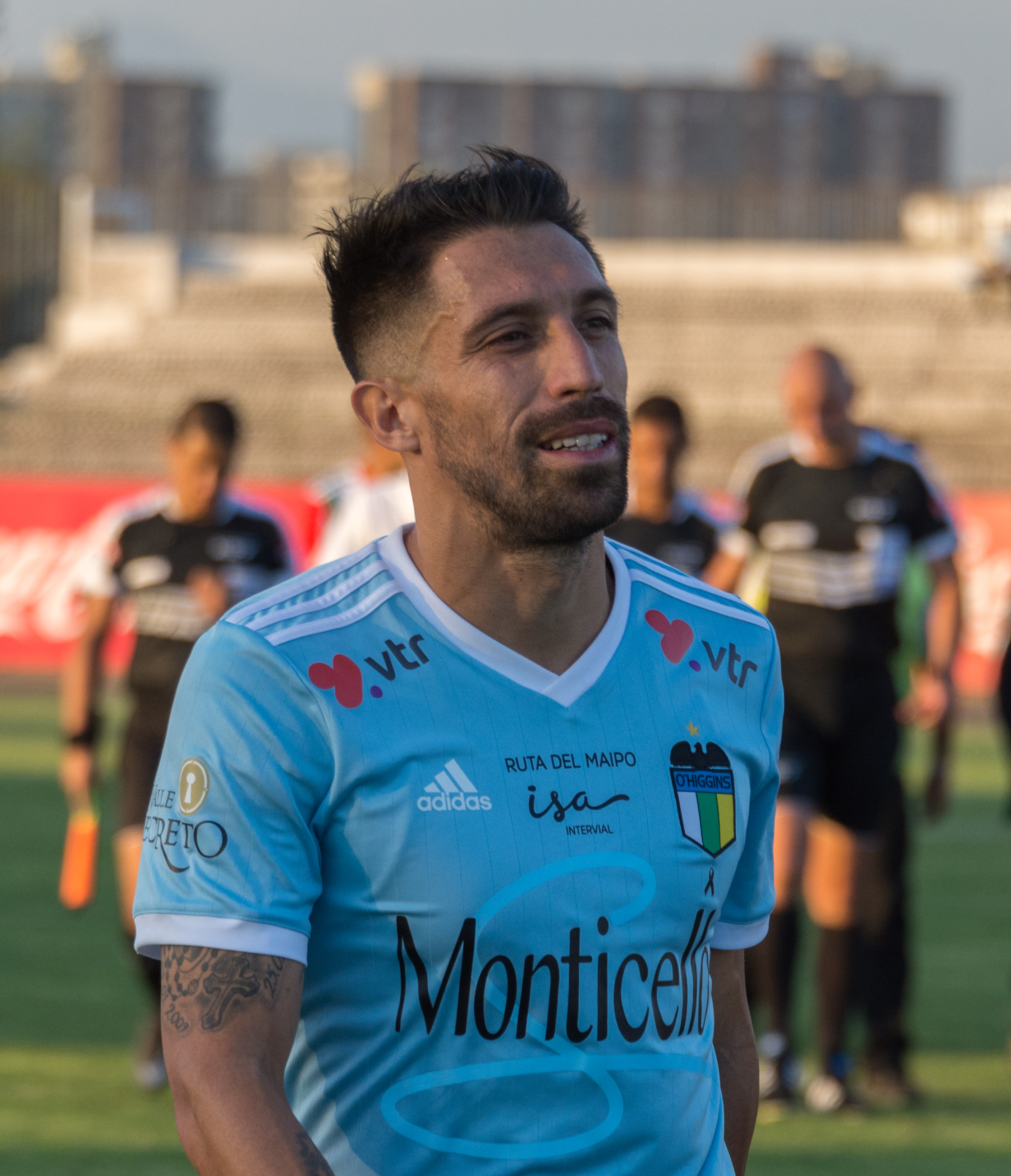 José Luis Muñoz, Palestino v O'Higgins, Estadio Municipal de La Cisterna, La Cisterna, Santiago, Chile.